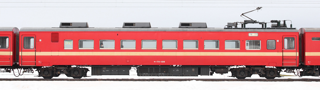 JR Hokkaido's type Moha 711-100 ( Minenobu Stn. - Koushunai Stn. )